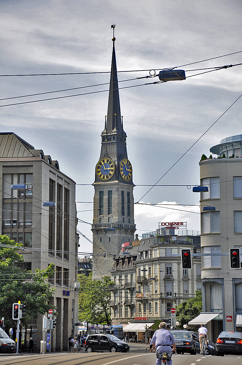 Blick zum Stauffacher mit der Kirche St. Jakob, Zürich